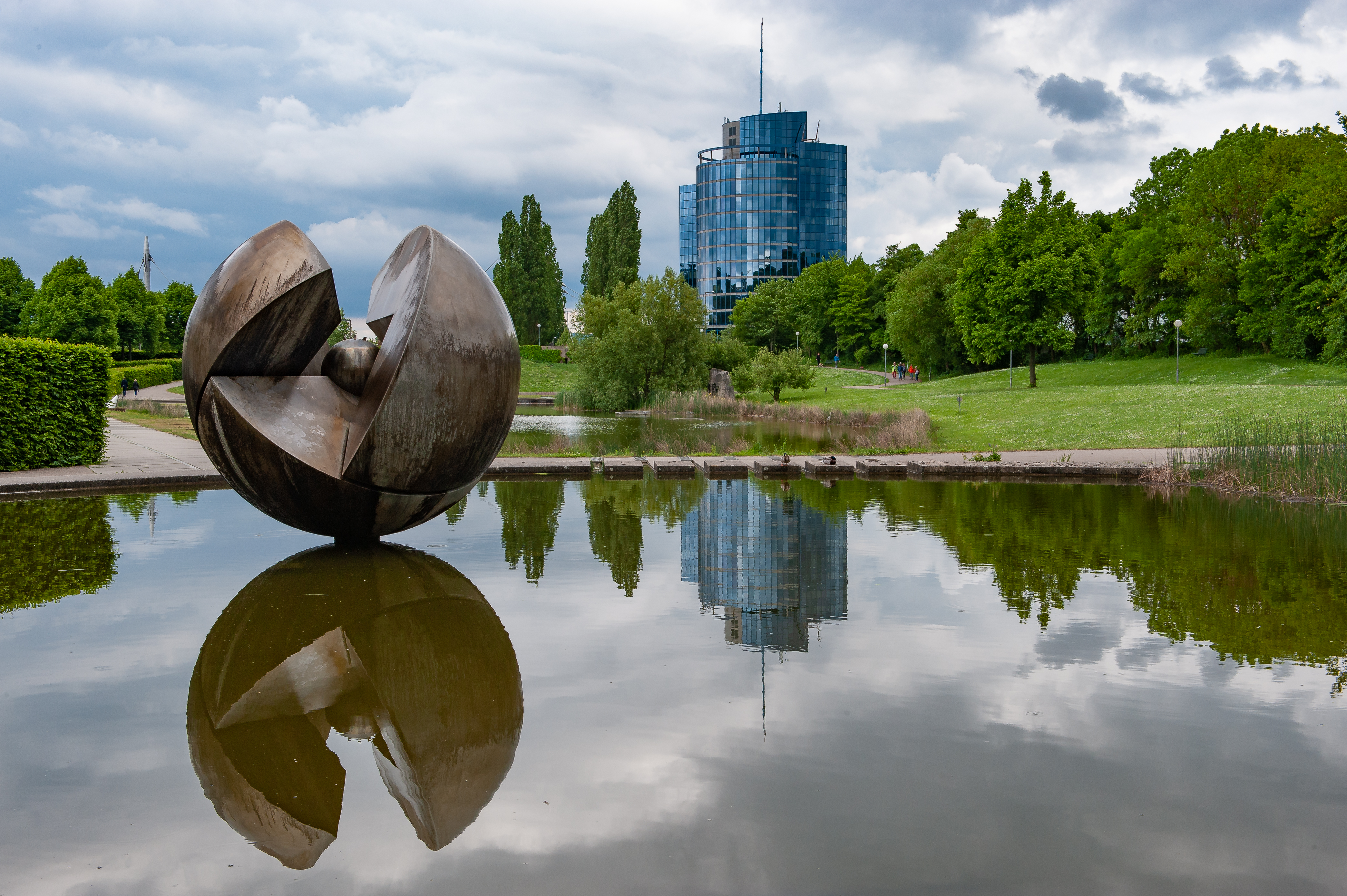 Kugelobjekt von Hans Dieter Bohnet, Gelände der Internationalen Gartenbauausstellung 1993, Stuttgart